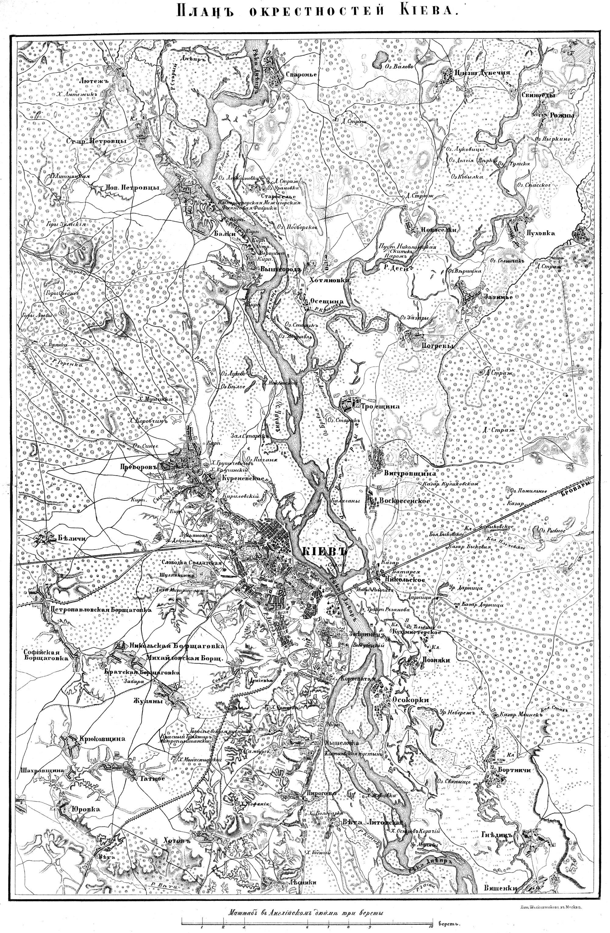 Карта околиць Києва, середина ХІХ ст., 1850 рік